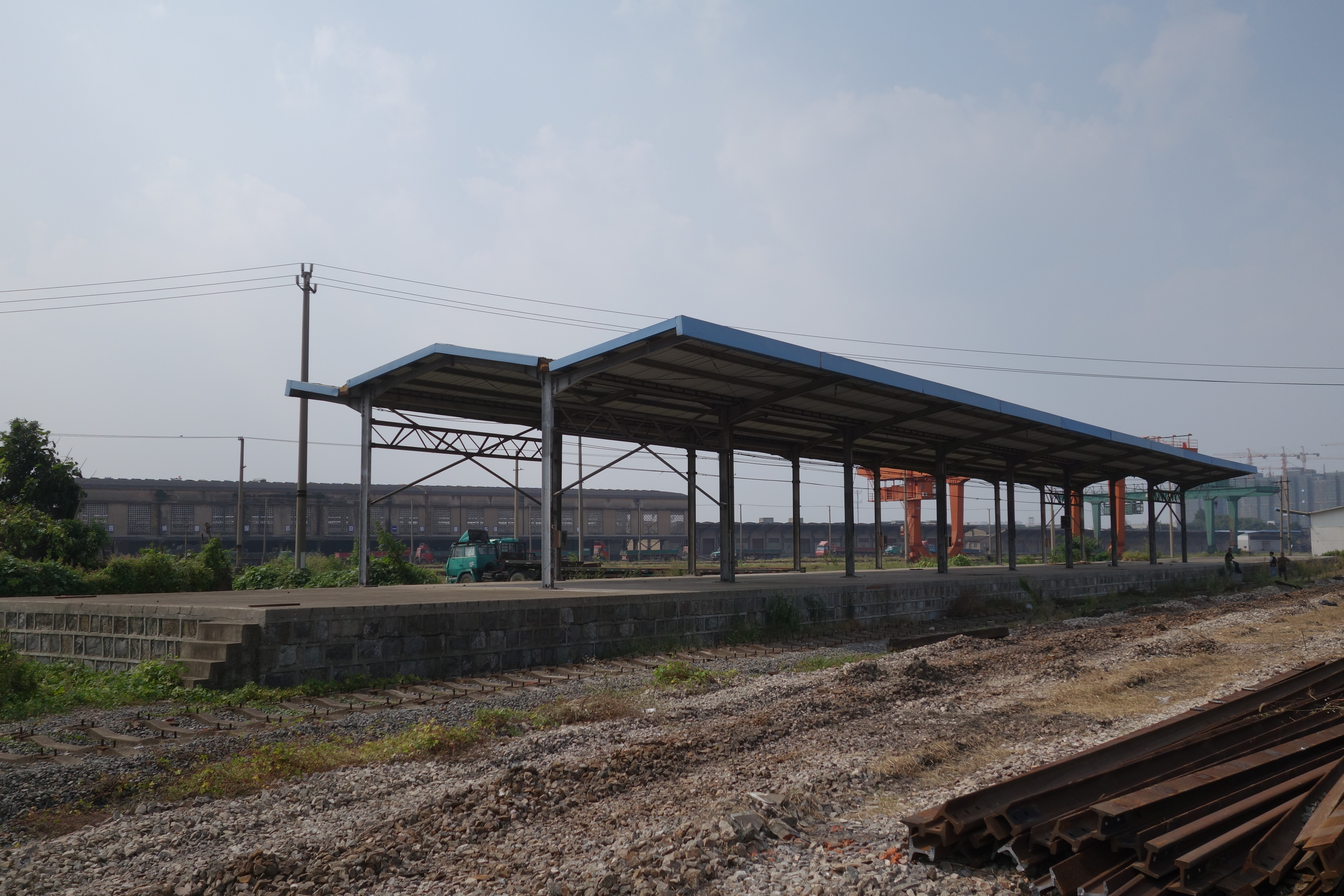 宁波北站旧站房